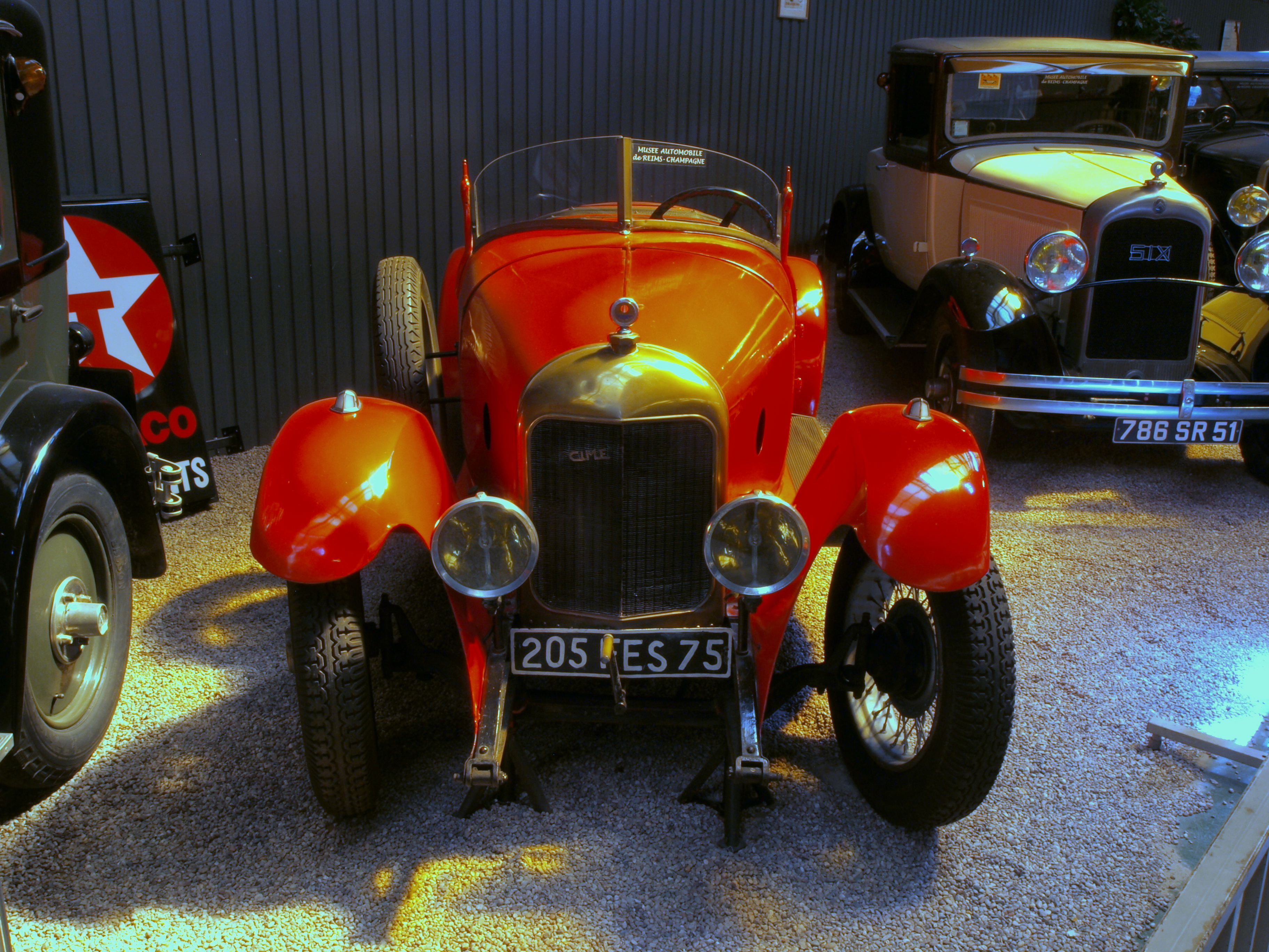 CIME A2